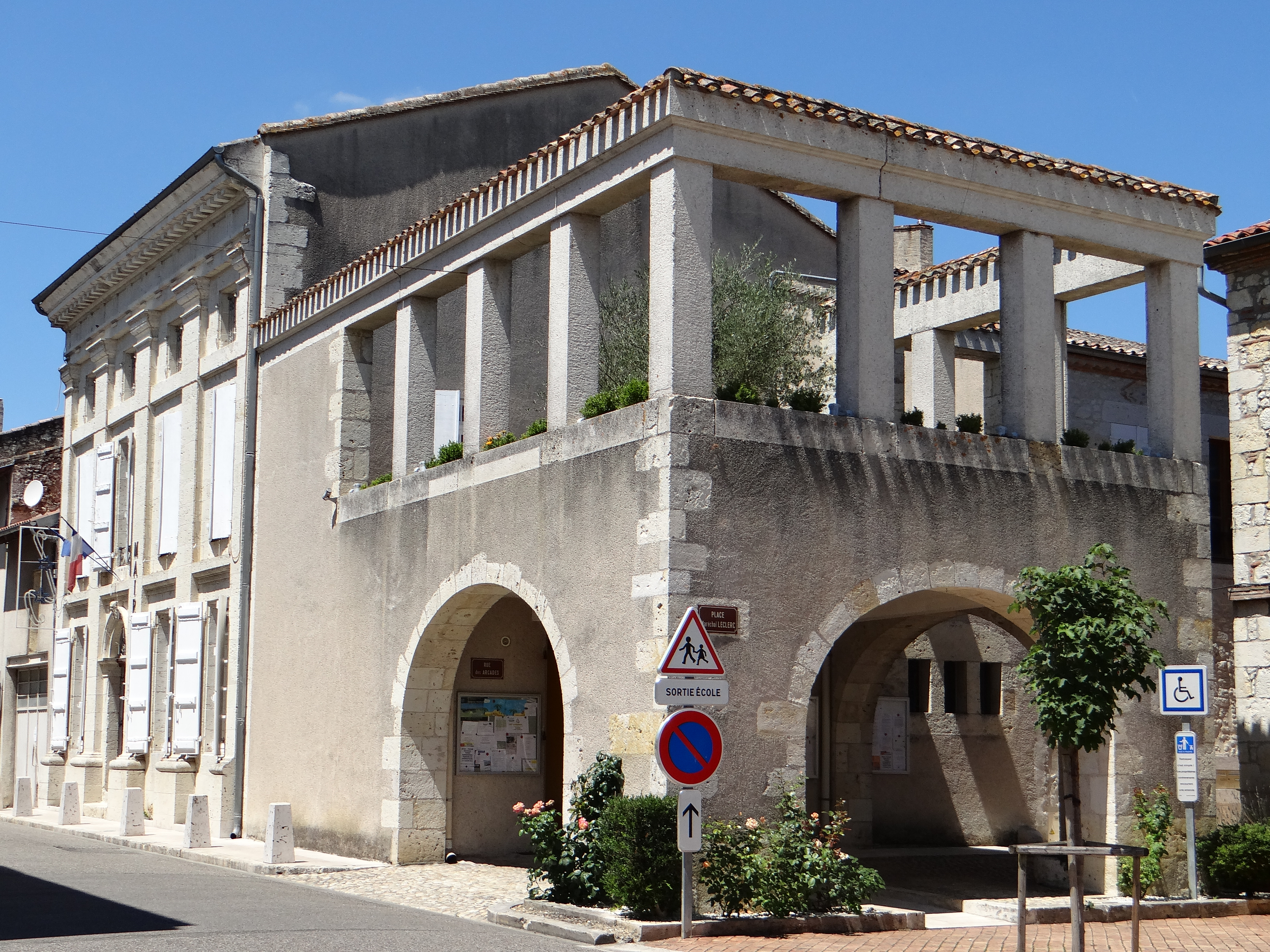 Puymirol - Mairie, rue Royale